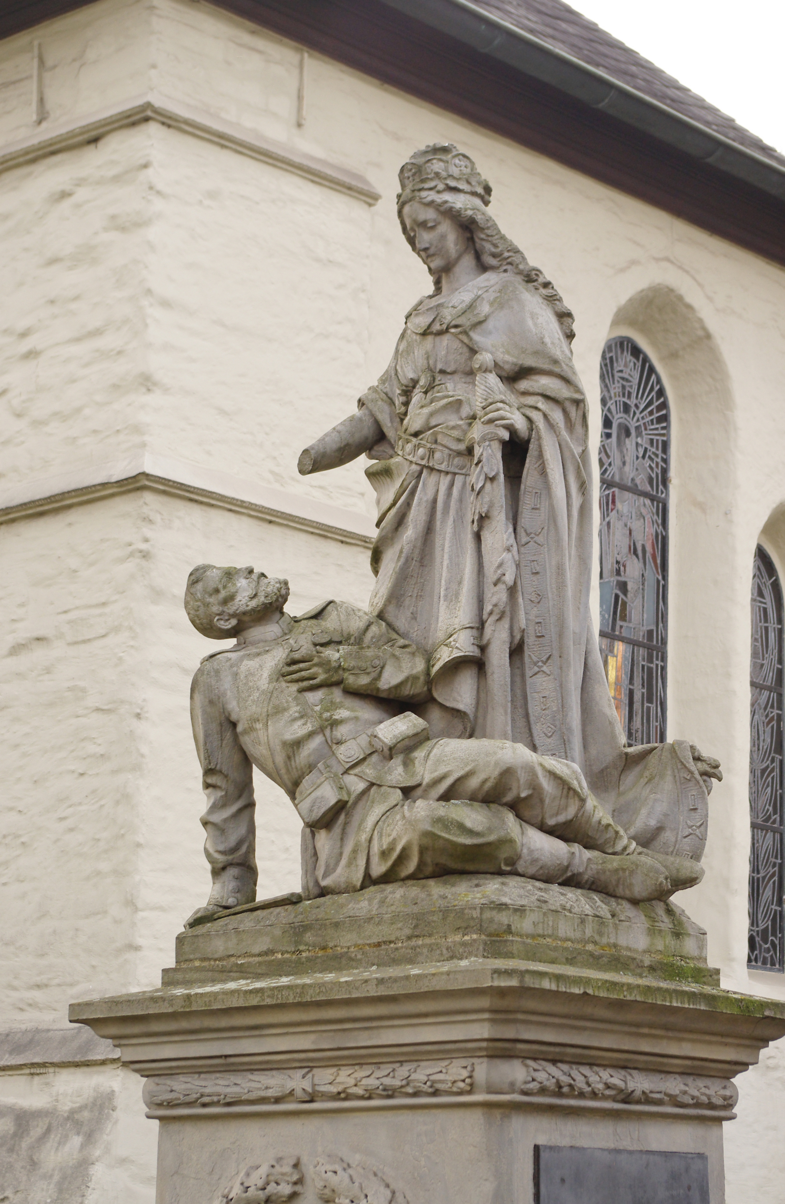 Kriegerdenkmal bei der evangelischen Kirche in Dortmund-Wickede This is a photograph of an architectural monument. 0426